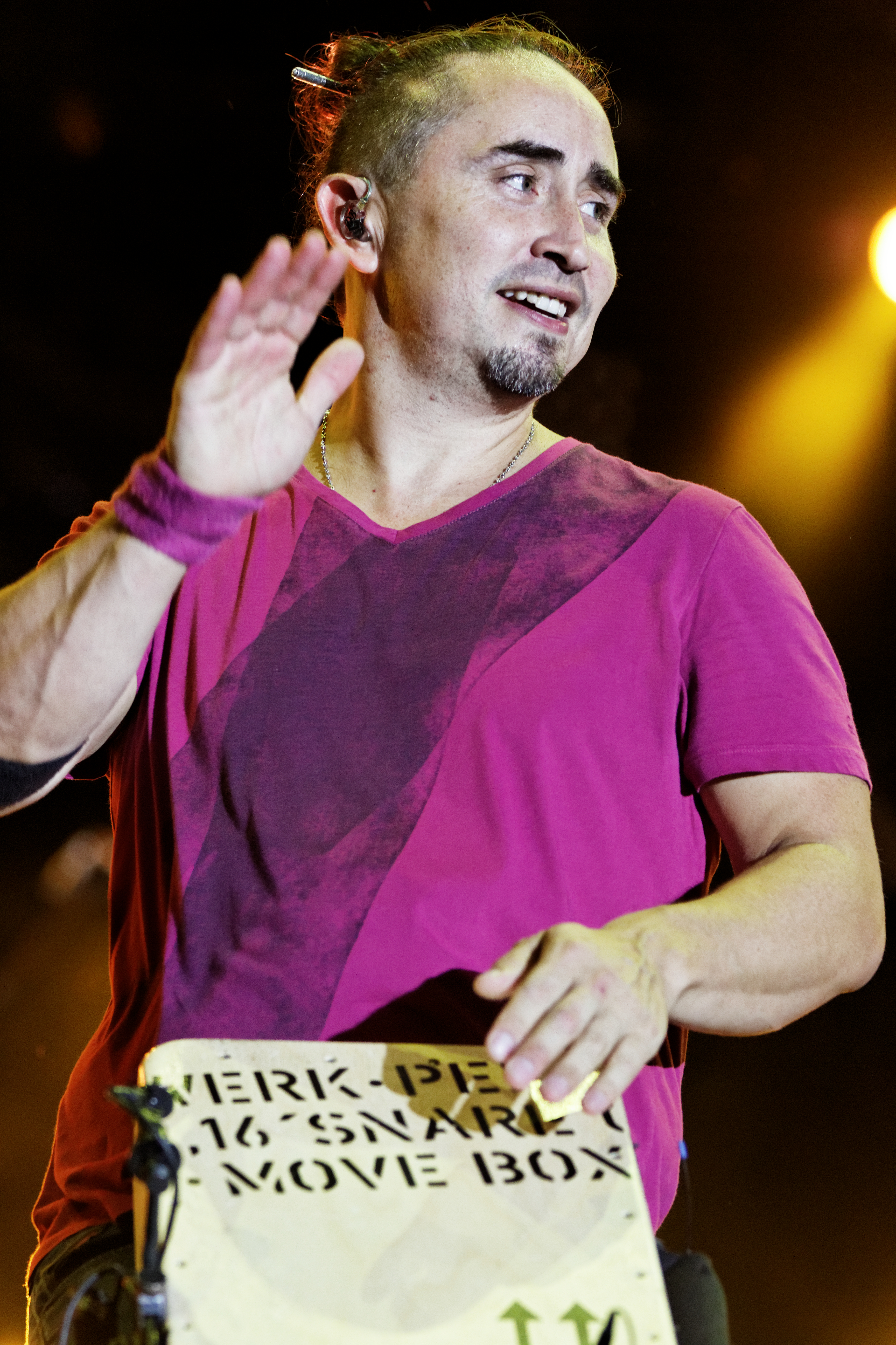 Tryo en concert sur la grande scène lors de la fête de l'Humanité 2013.